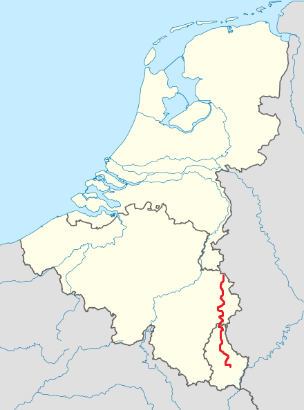 Traject E421